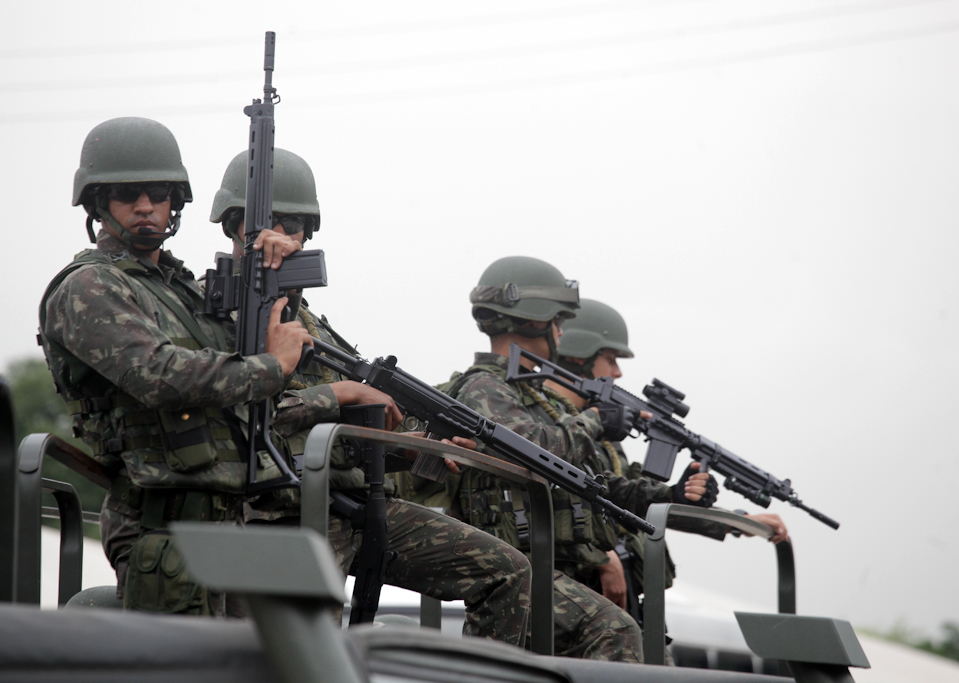 17/03/2015, Rio de Janeiro - RJ Fotos: Felipe Barra